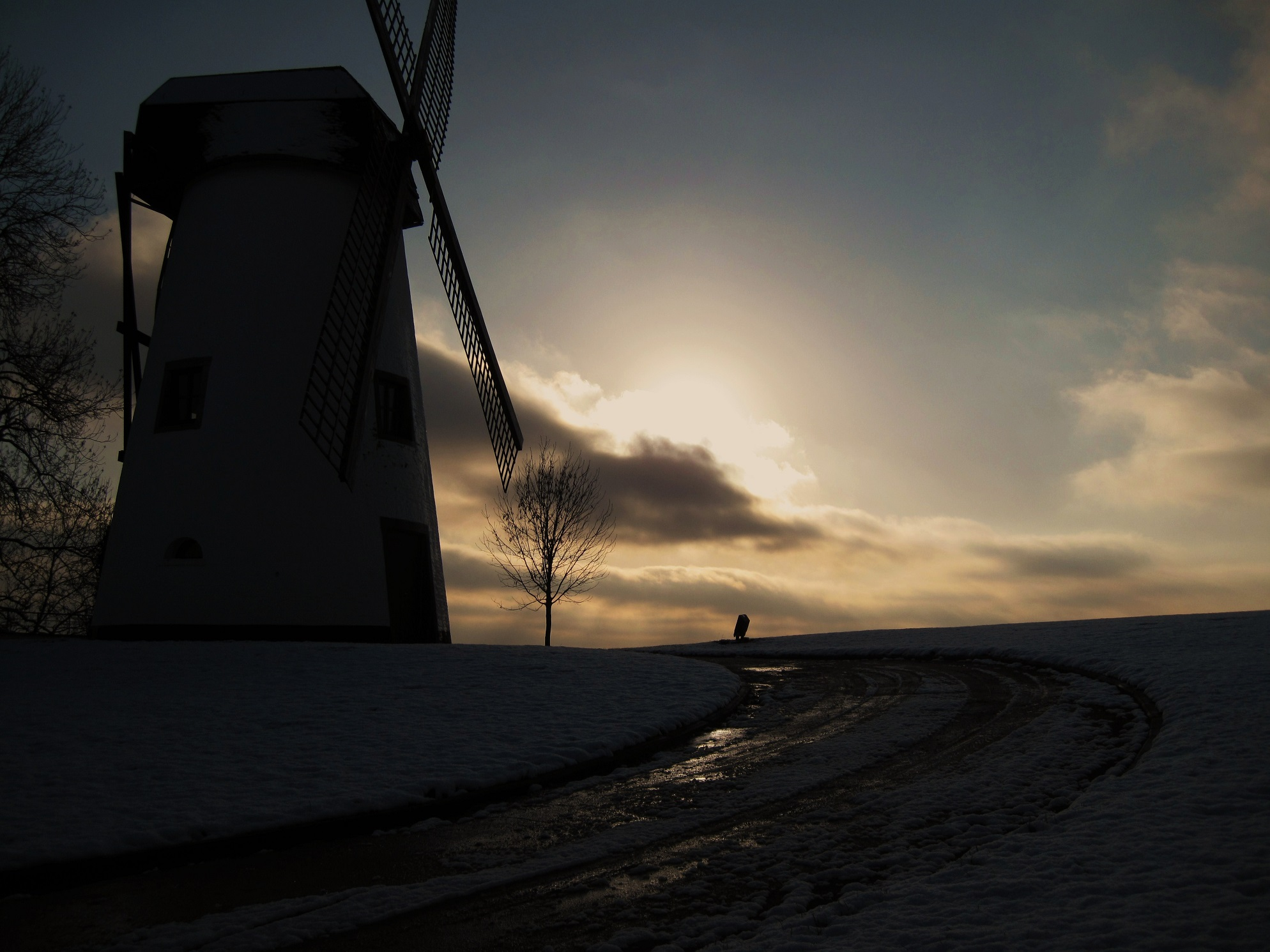 Moulin à vent à Opprebais, Brabant Wallon, Belgique